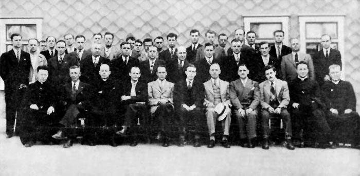 La Fédération des Syndicats catholiques des ouvriers de l'amiante a tenu son congrès annuel à Asbestos le 4 août. Dans la photo ci-dessus, on reconnaît au premier rang, de gauche à droite : M. l'abbé Lucien Poulin, aumônier diocésain; Rodolphe Hamel, président du Syndicat local; M. l'abbé H. Masson, aumônier de la Fédération; Gérard Picard, secrétaire de la C.T.C.C.; L.-P. Martineau, secrétaire de la Fédération; D. Lessard, président de la Fédération; Alfred Charpentier, président de la C.T.C.C.; J. Marchand, conseiller technique de la C.T.C.C.; M. l'abbé G. Léveillé, aumônier du Syndicat local; M. l'abbé A. Deslandes, curé de la nouvelle paroisse d'Asbestos, Saint-Isaac Jogues.